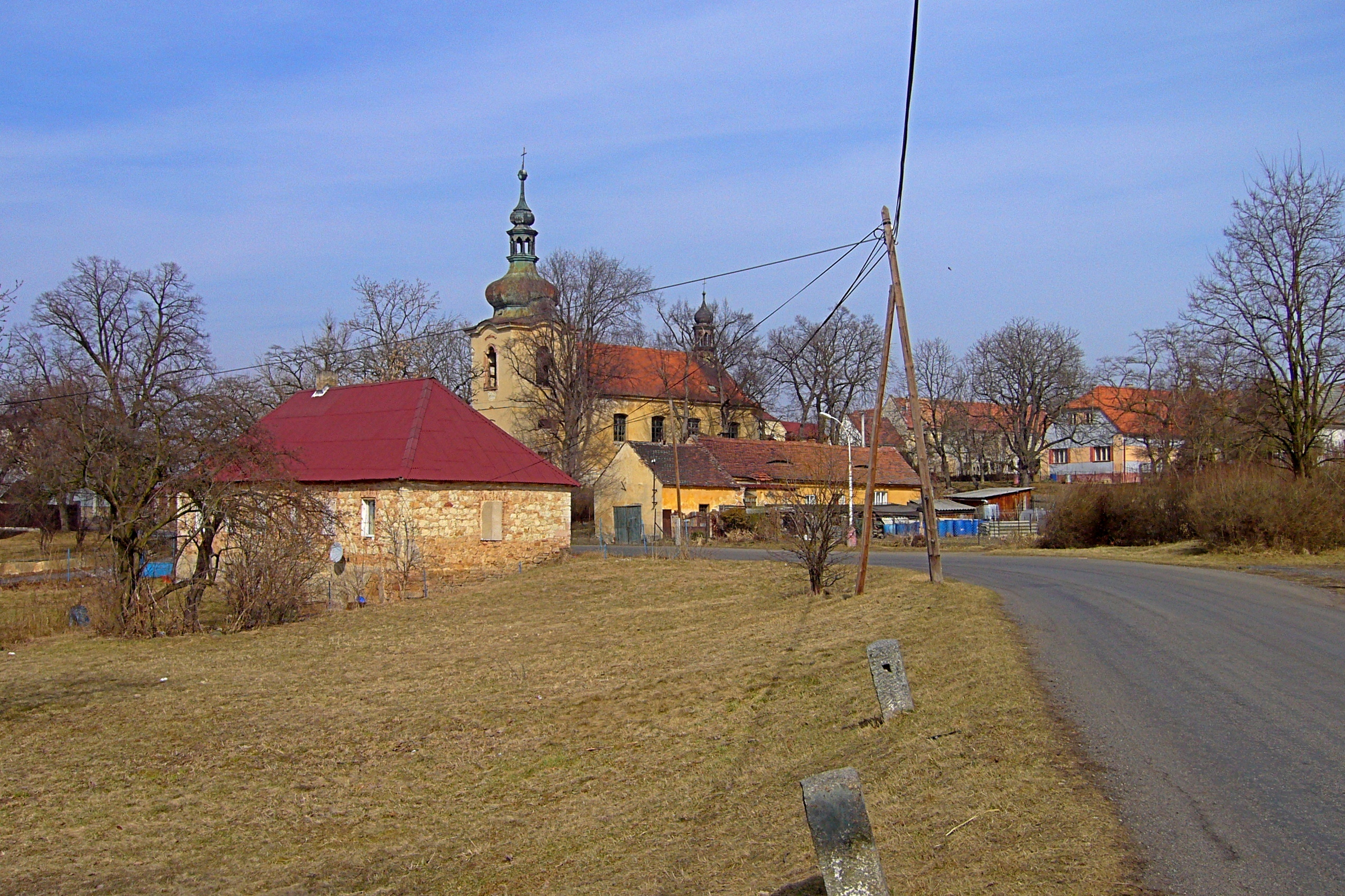 Letov - pohled od západu